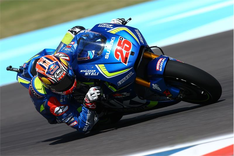 Al G.P. de la República Argentina del 2016